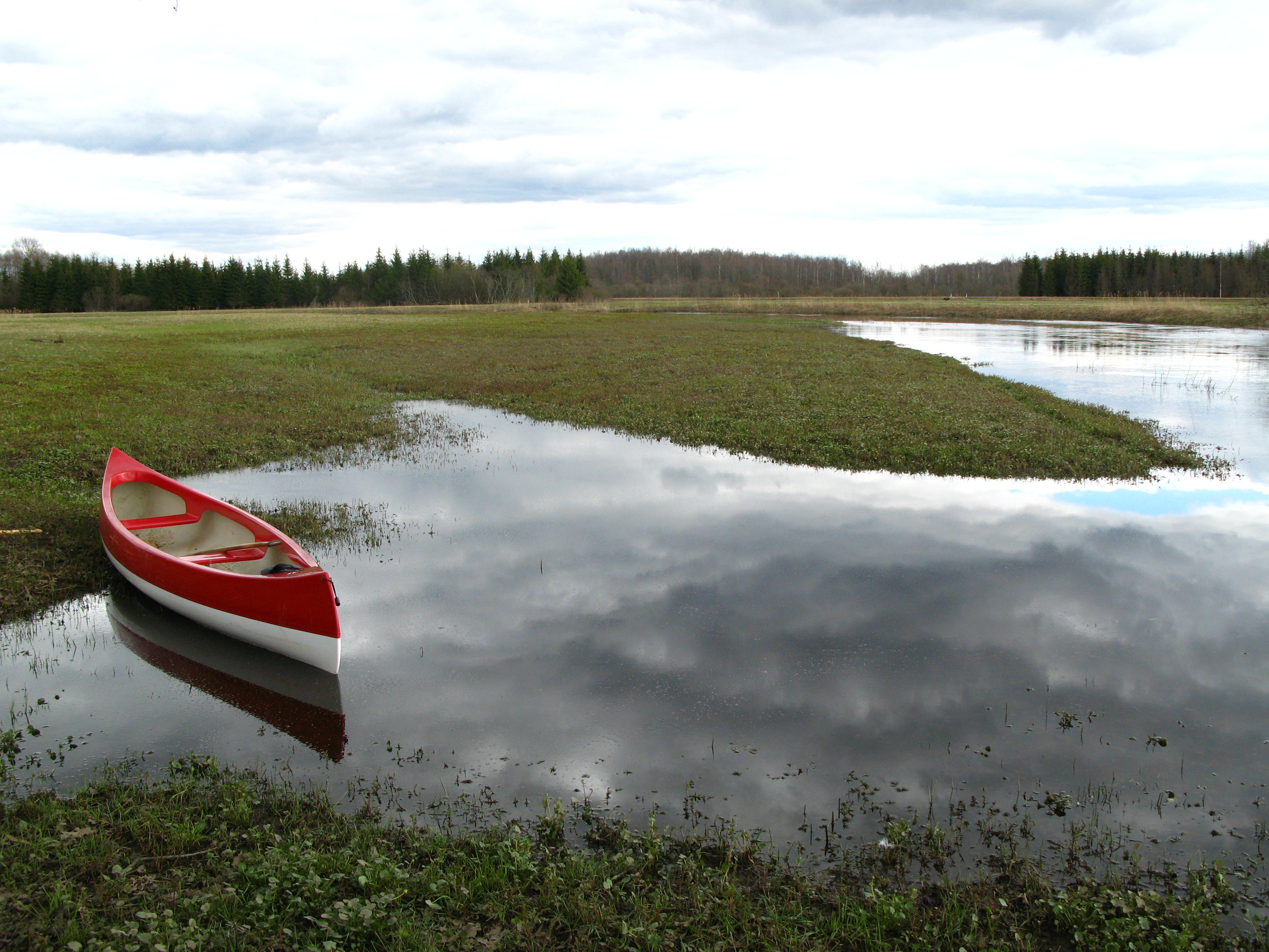 Raudna jõgi